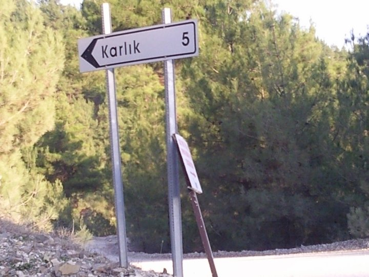 karlik 5